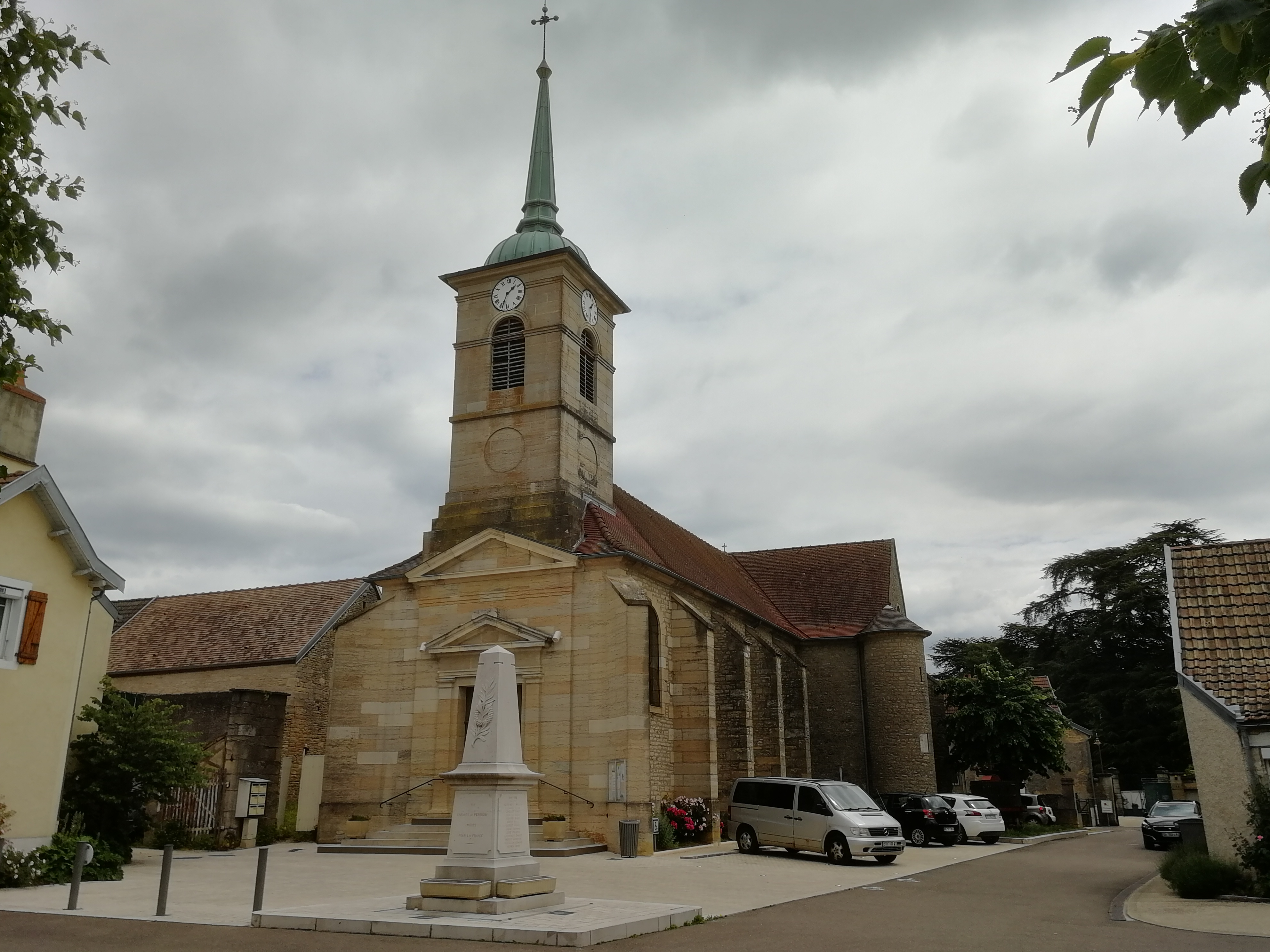 Perrigny-lès-Dijon, Côte-d'Or, Bourgogne, France